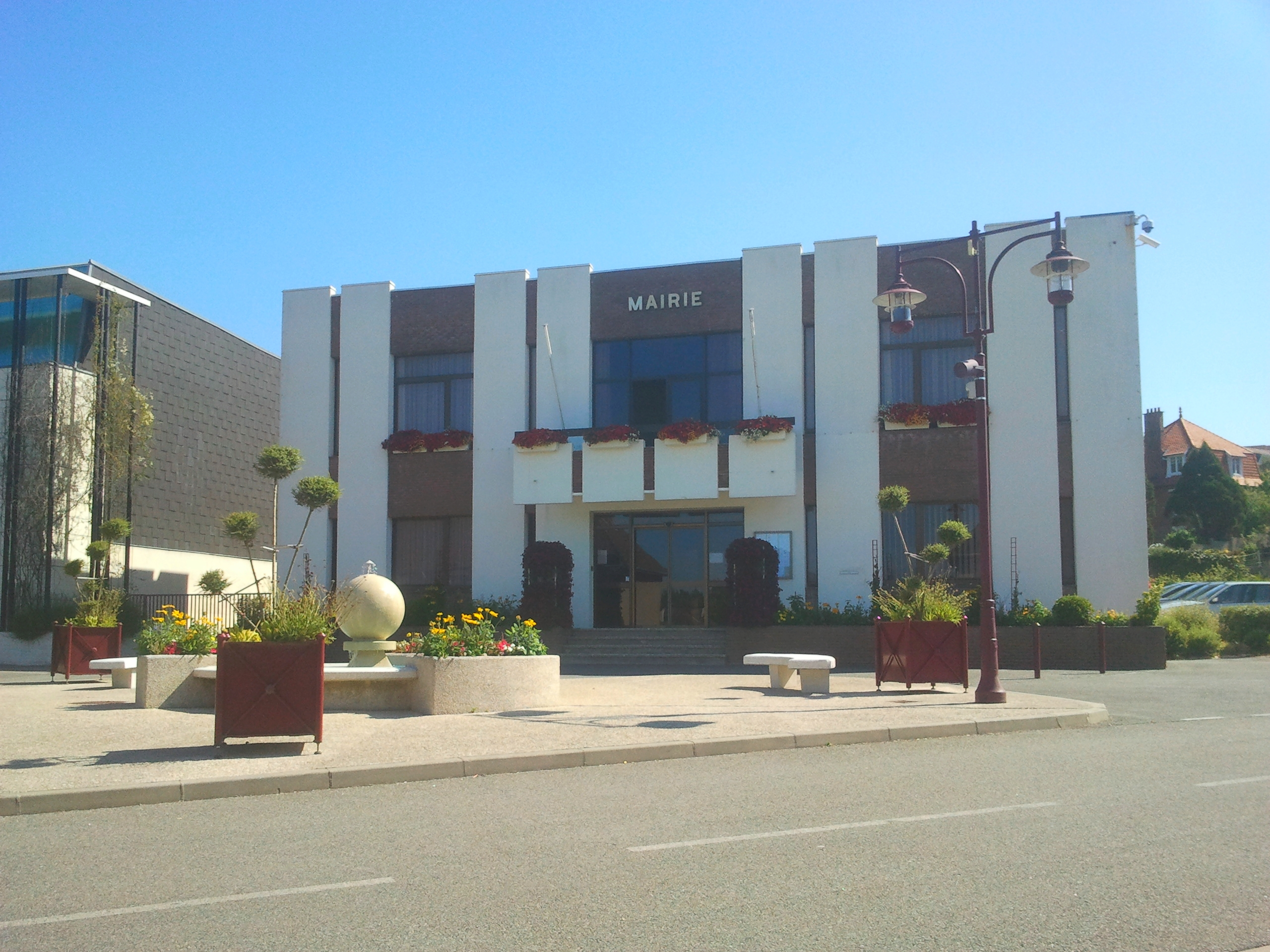 Mairie de Saint-Léonard (62)